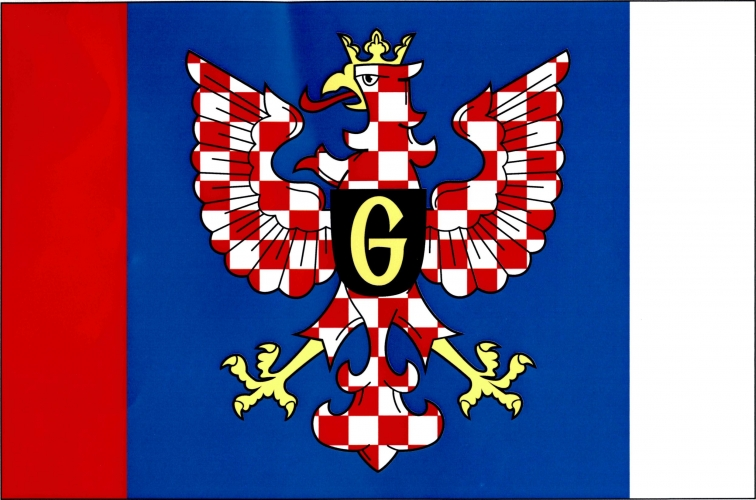 Vlajka, Jevíčko, okres Svitavy